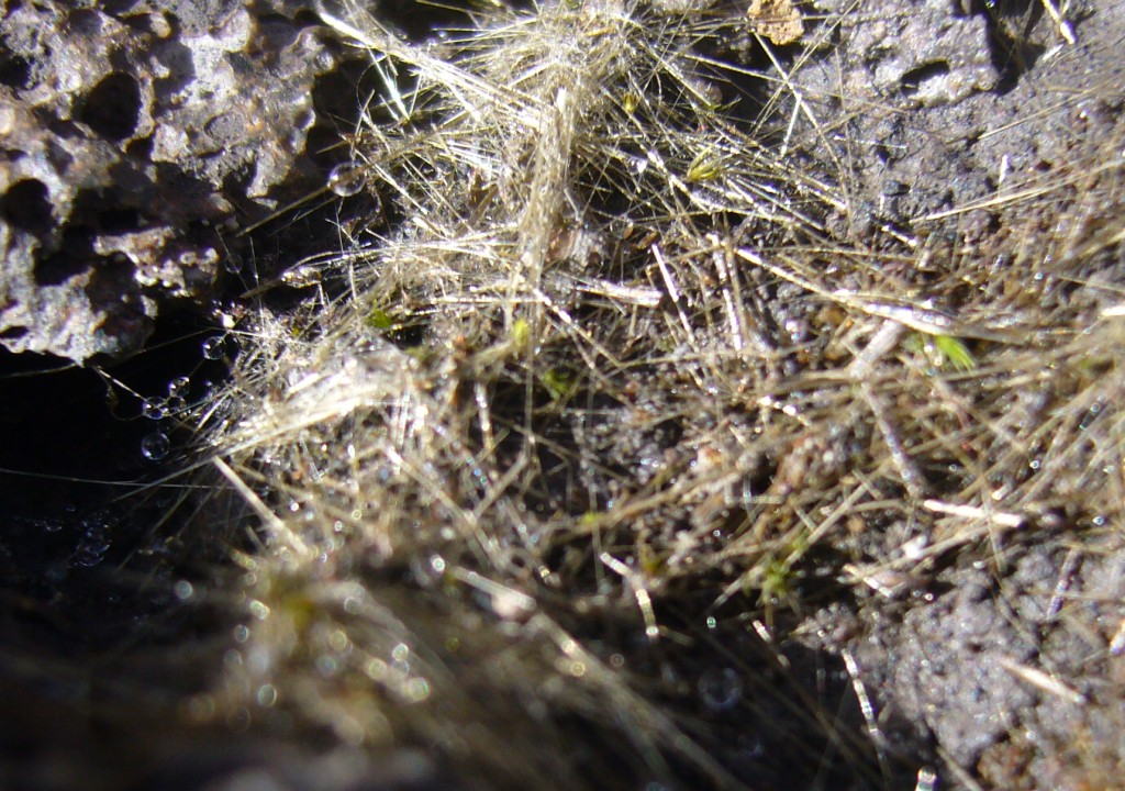 Cheveux de Pelé au Piton de la Fournaise